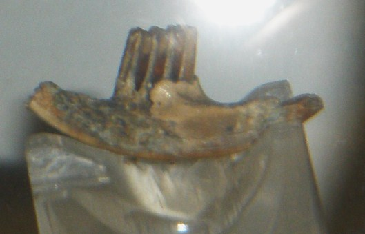 Fossil of Mimomys, an extinct mammal- Took the picture at Museo di Paleontologia di Firenze